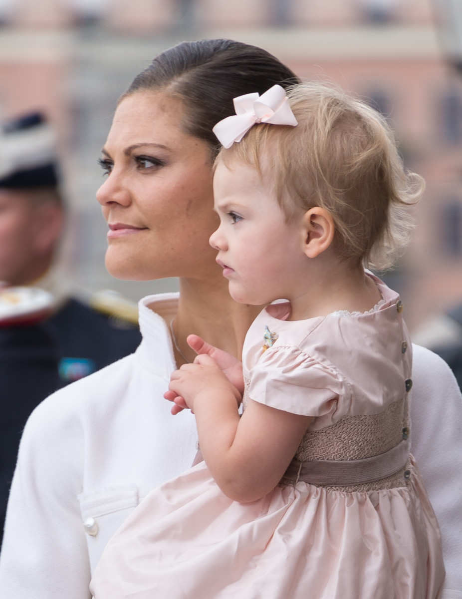 Kronprinsessan Victoria med prinsessan Estelle i samband med att Carl XVI Gustaf firar 40 år på tronen på på Stockholms slott den 15 september 2013.